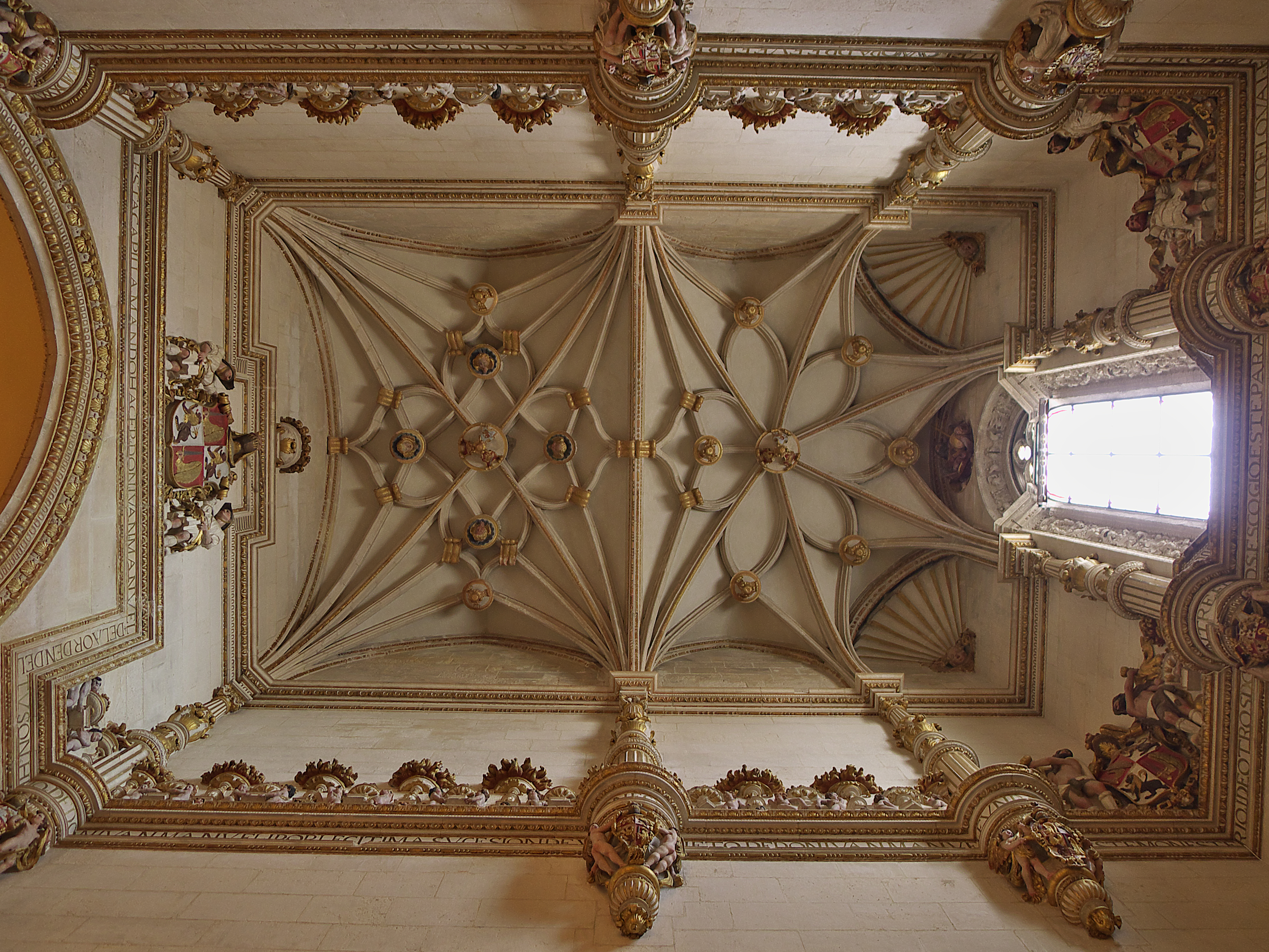 Sobre estructura gótica, Juan de Badajoz el Mozo, realiza una bóveda con plementería continua (1536), profusamente decorada con elementos clásicos. Estilísmo hispano-flamenco y formas platerescas.